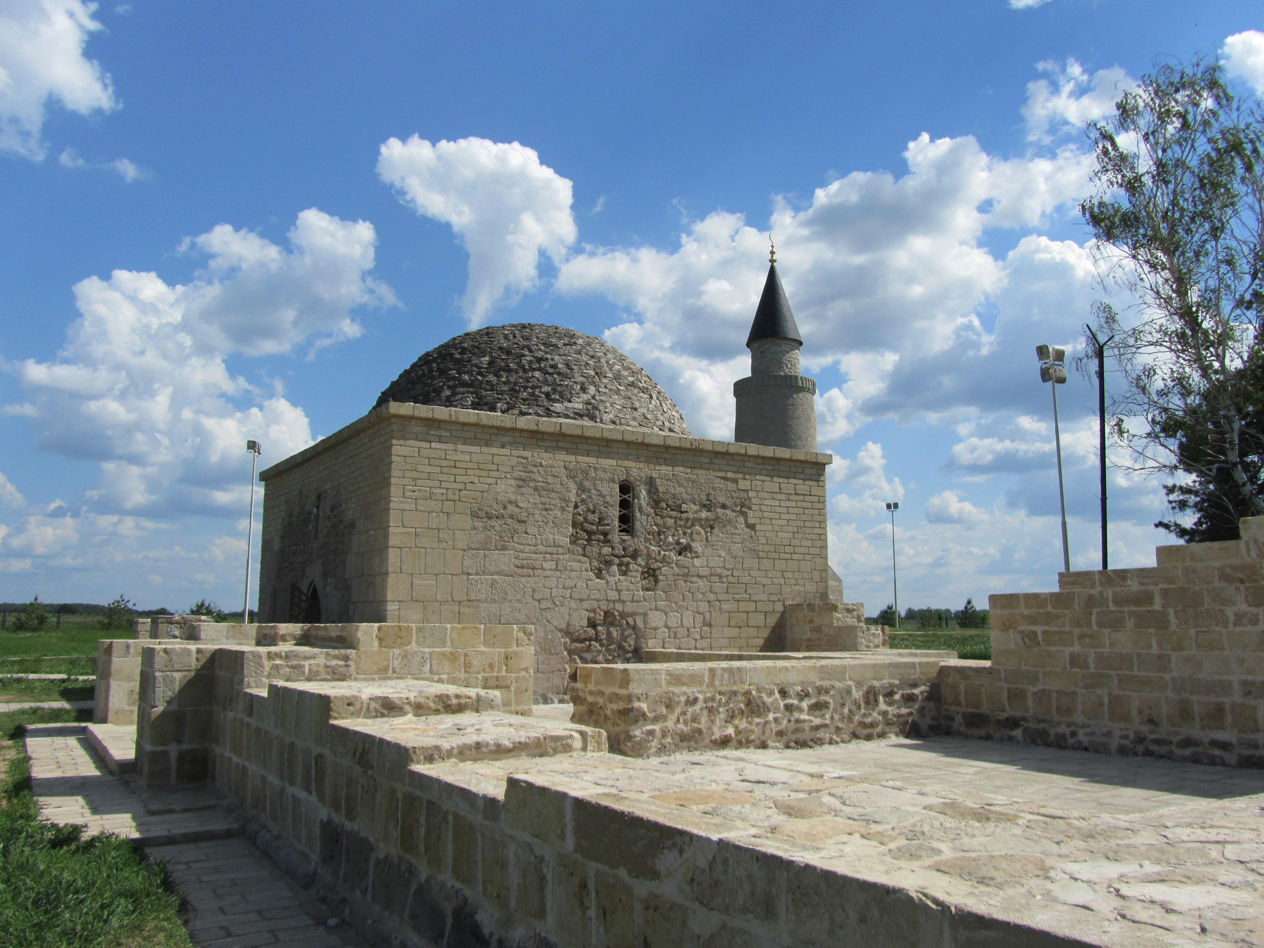 Комплекс памятников архитектуры XIII-XIV вв. на территории Булгарского городища (архитектурный комплекс «Болгары») (Республика Татарстан, Болгар, село Болгары, городище)